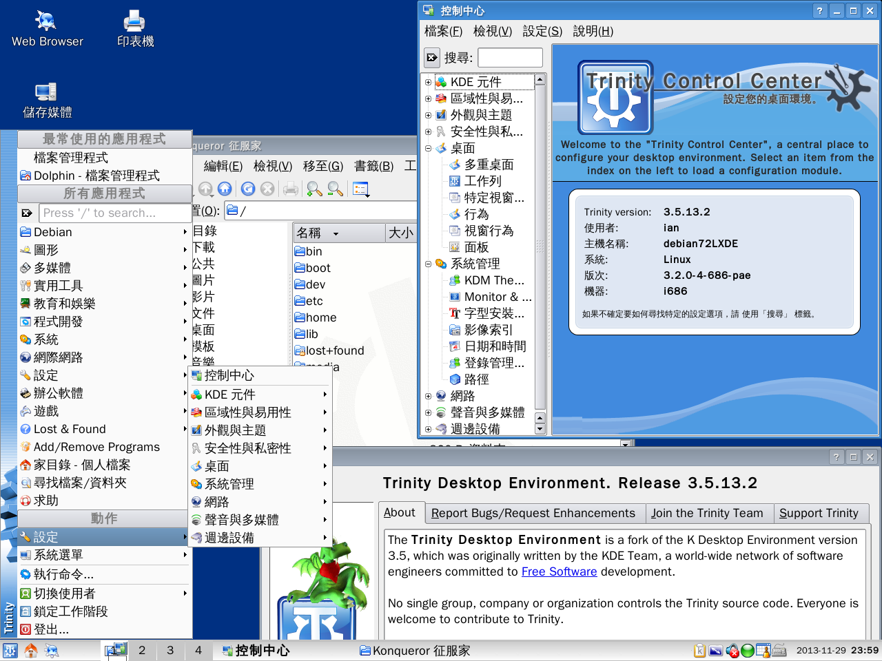 Trinity Desktop Environment 3.5.13.2 版，正體中文語系介面，額外安裝於Linux發行版 Debian 7.2